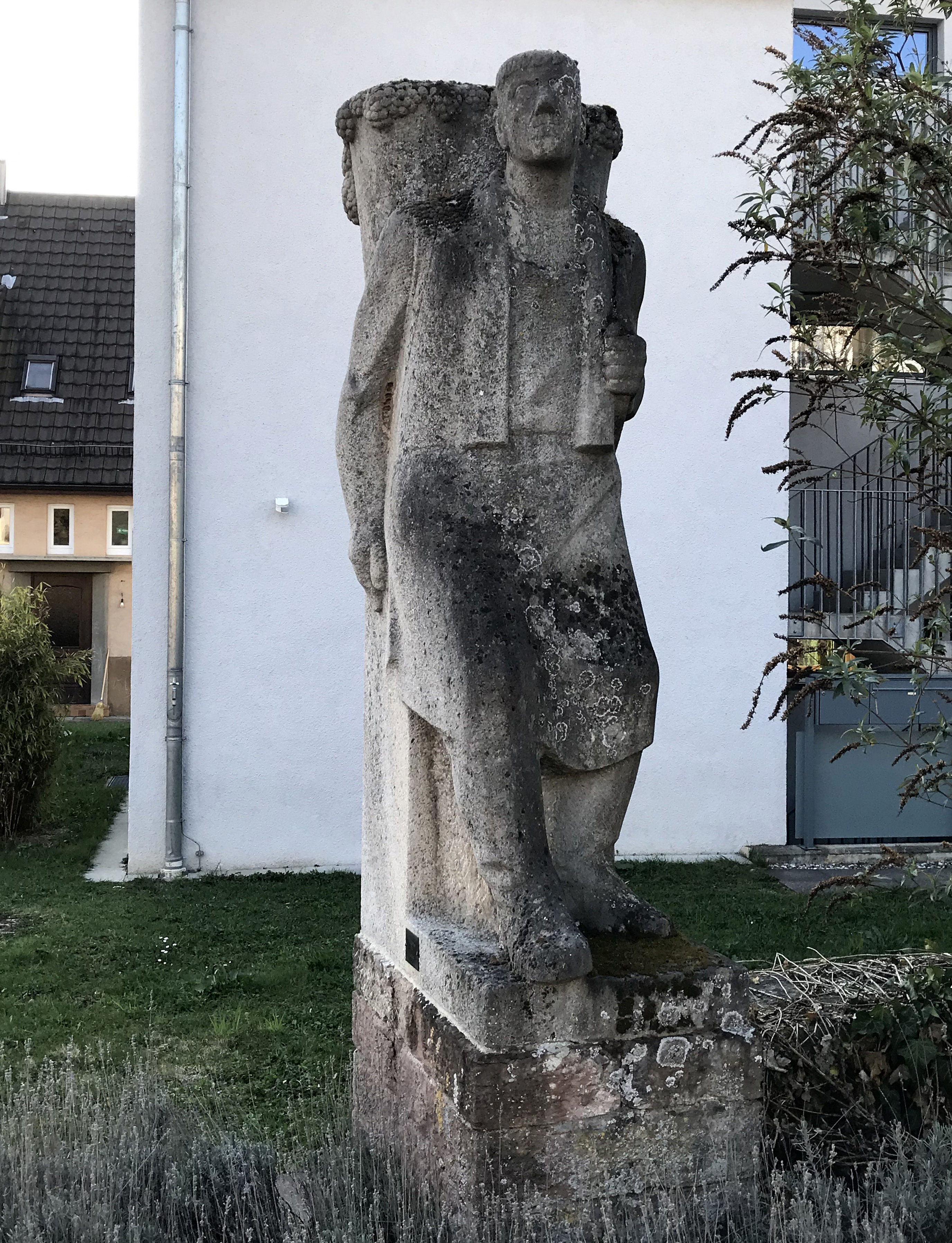 Fritz Nuss - Weingärtner (Stein 1985) im Kirschblütenweg in Strümpfelbach